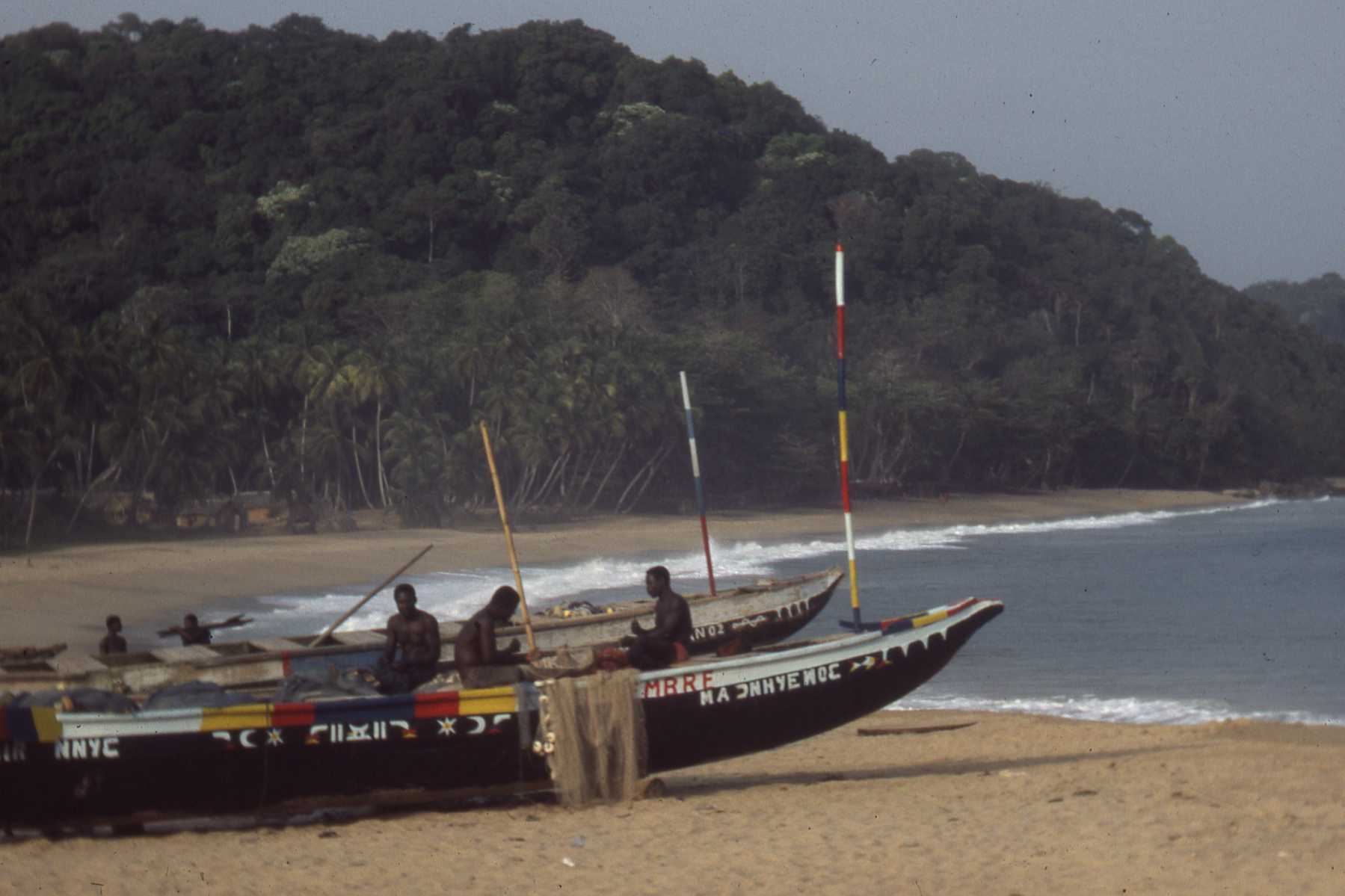 Pecheurs Fanti dans la région de Sassandra, au sud de la Cote d'Ivoire